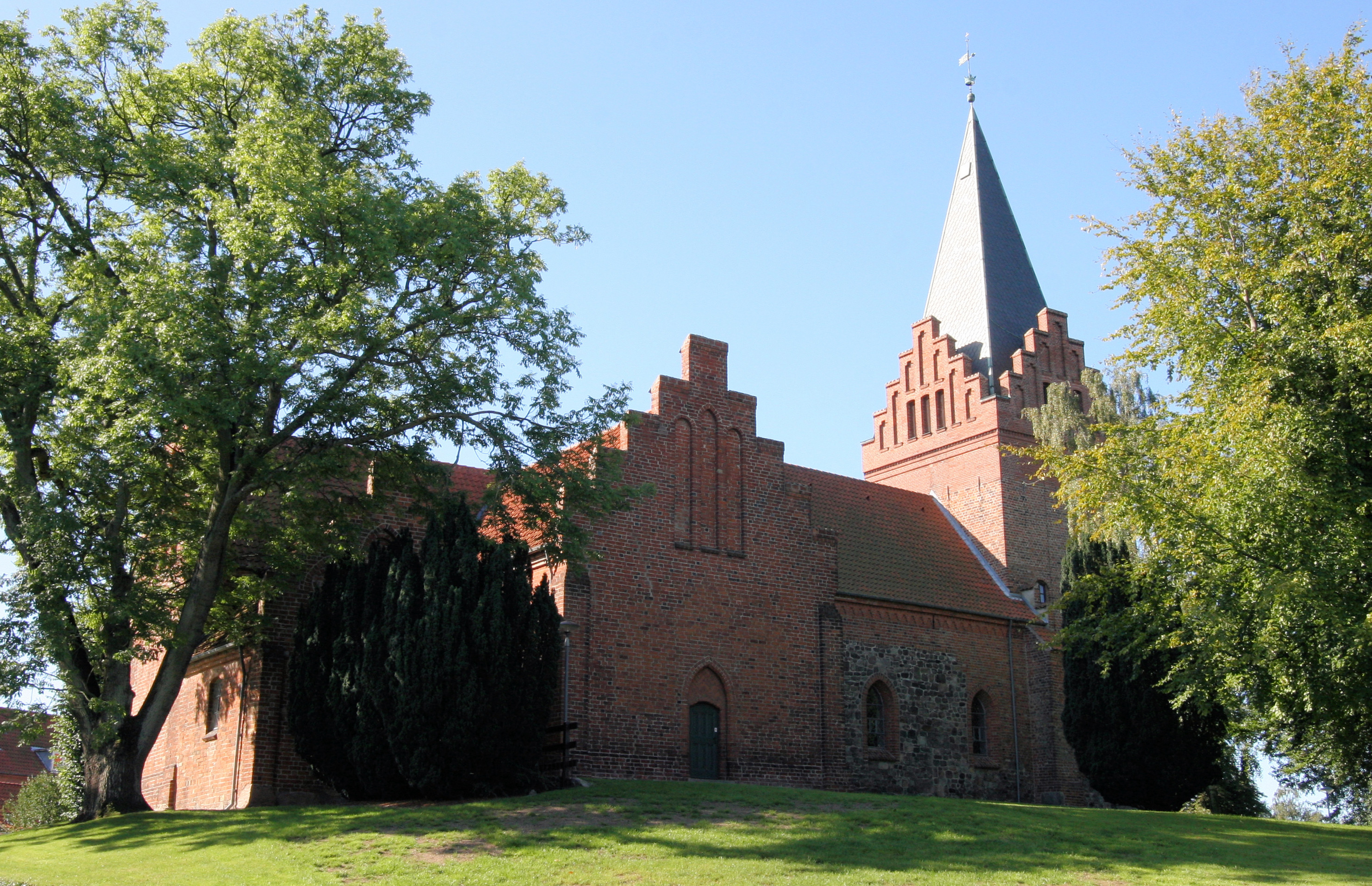 Sankt Peders Kirke in Slagelse, Denmark. From Northeast